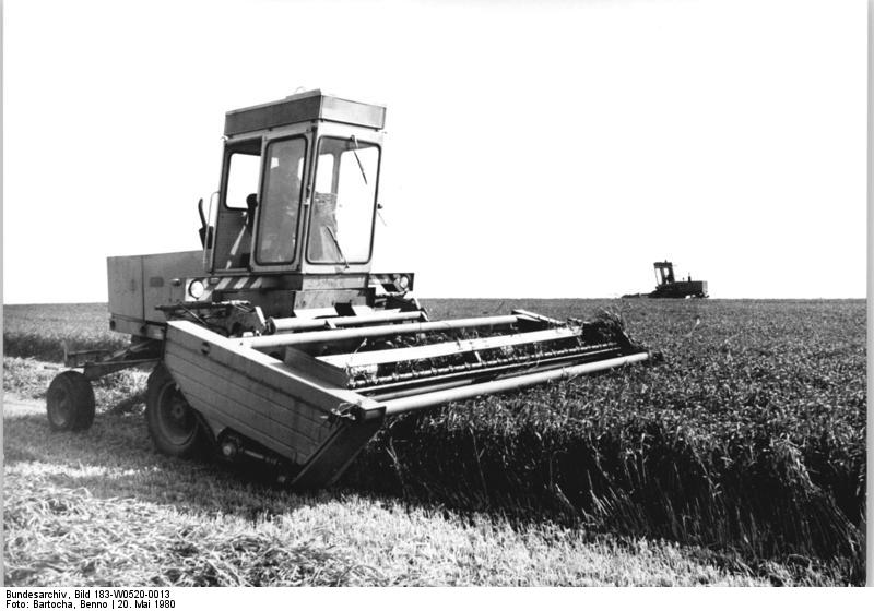 ADN-ZB / Bartocha / 20.5.80 / Bez. Neubrandenburg: Mit der Ernte des Futterroggens haben vor wenigen Tagen die Genossenschaftsbauern der KAP Prenzlau begonnen. Ihre Schwadmäher und Häcksler setzen sich auf den Feldern im Komplex ein.